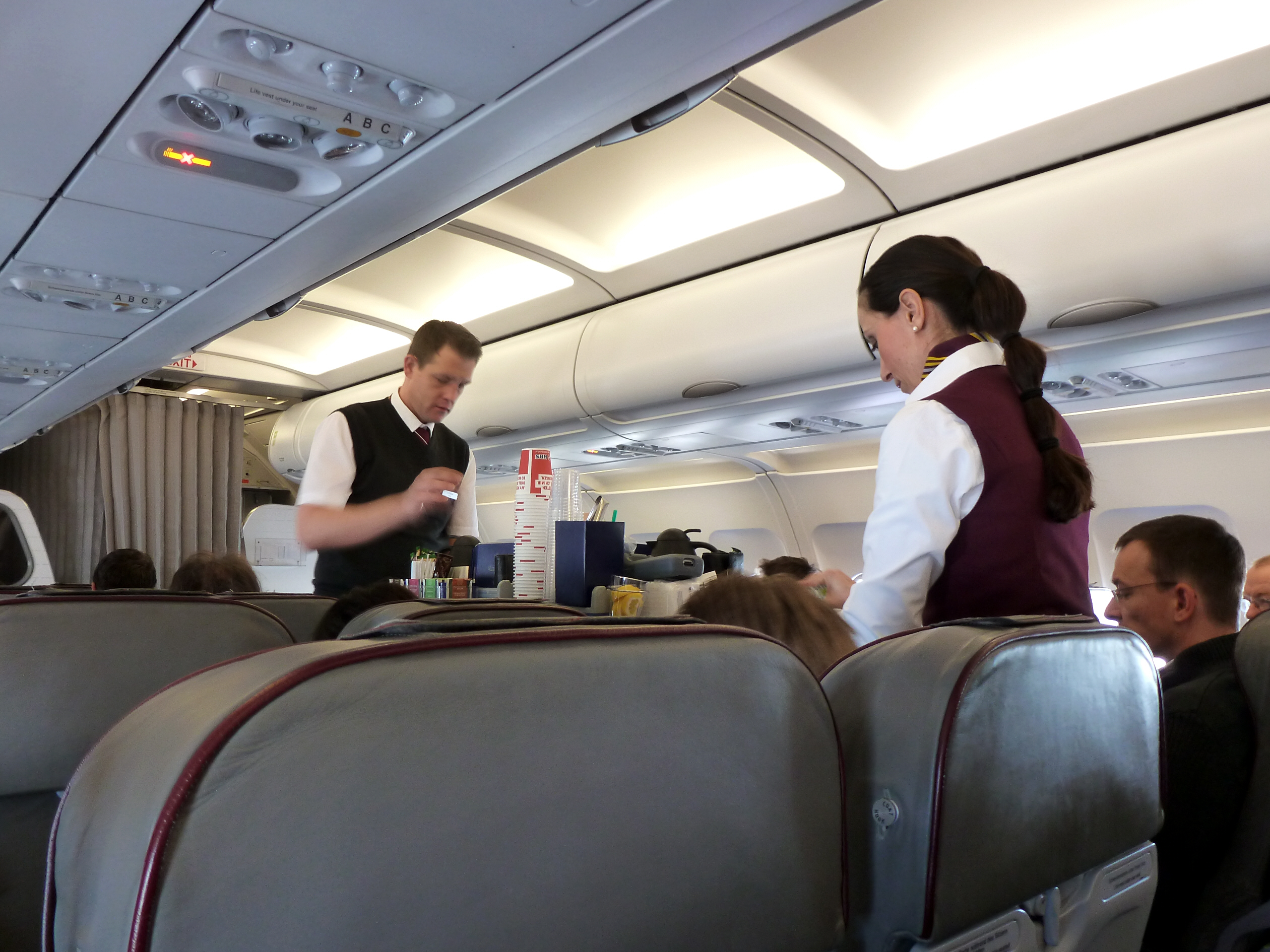 Service der Cabin Crew an Bord eines Airbus A319 der Germanwings im Bereich der "Best Seats" auf dem Flug von Hannover nach London Stansted.